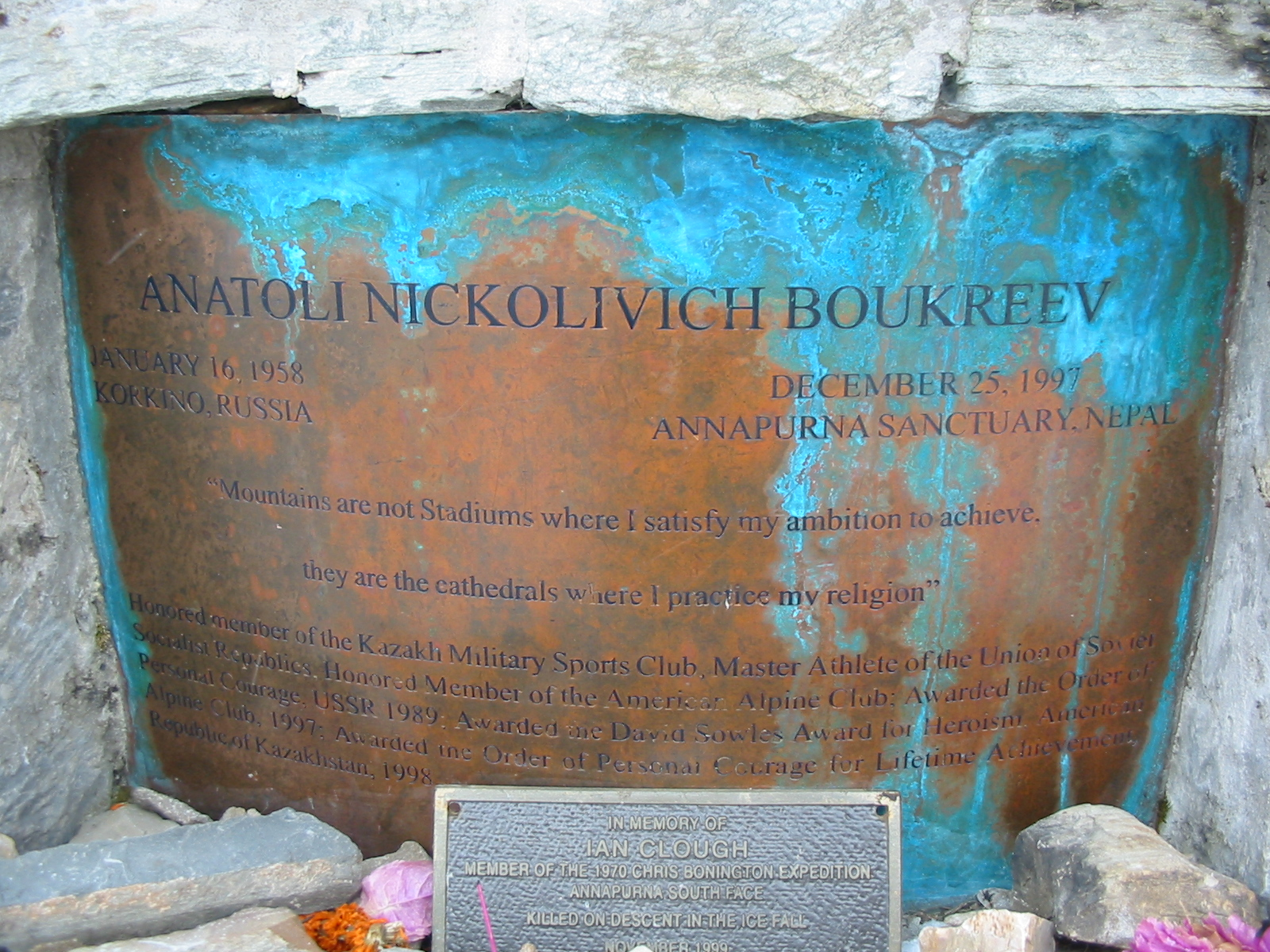 Anatoli Boukreev Memorial at Annapurna Base Camp Nepal